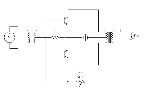 B-Endstufe mit unsymmetrischer Betriebsspannung